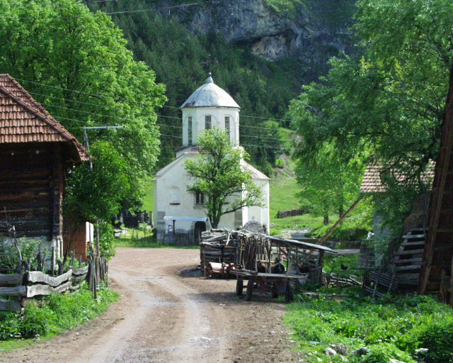 Crkva Stitkovo